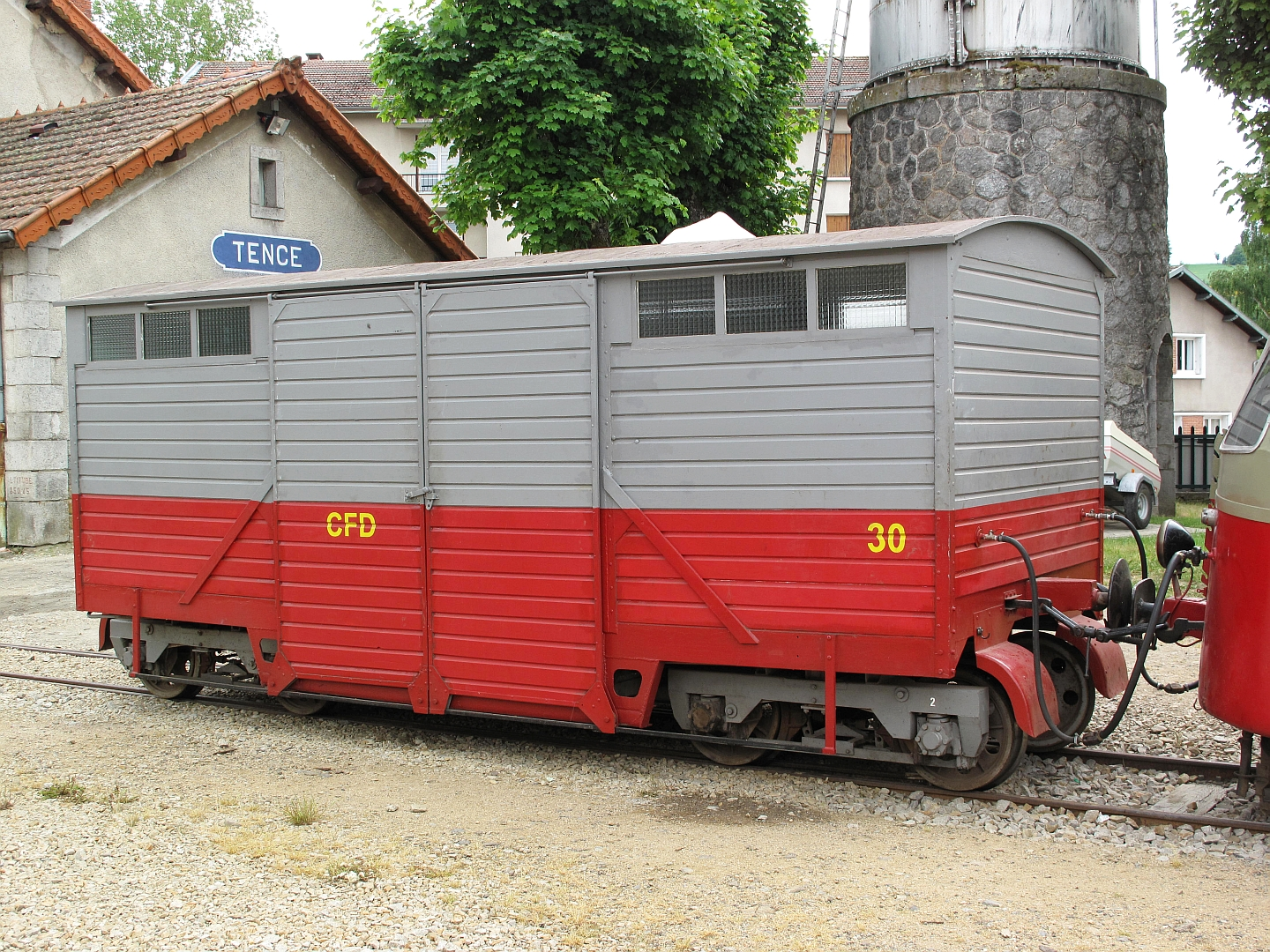 La remorque messagerie Billard RM30 des Voies Ferrées du Velay, à Tence le 20 mai 2011.